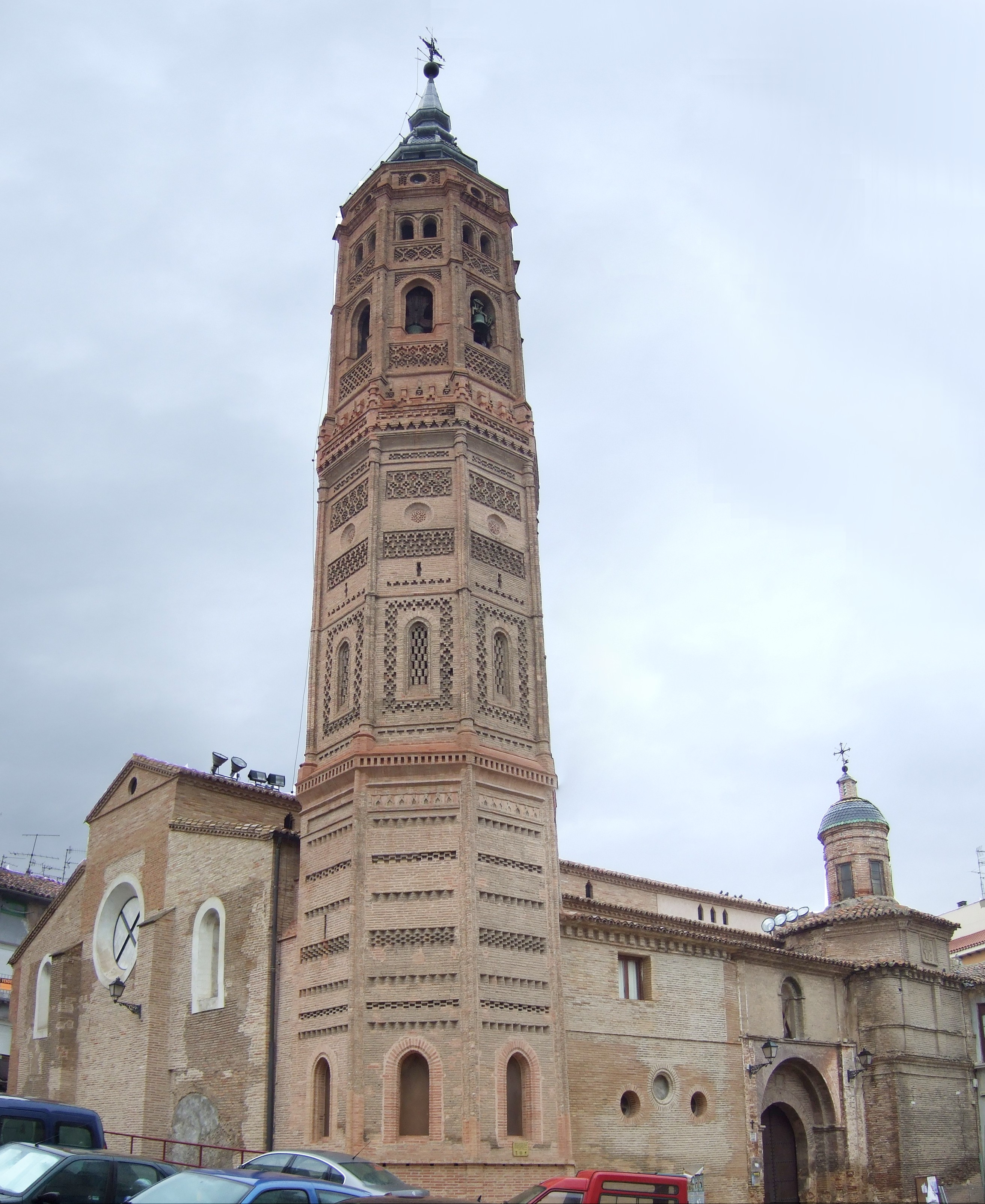 Calatayud - Iglesia de San Andrés - Fecha de construcción desconocida - Torre mudéjar acabada en 1509